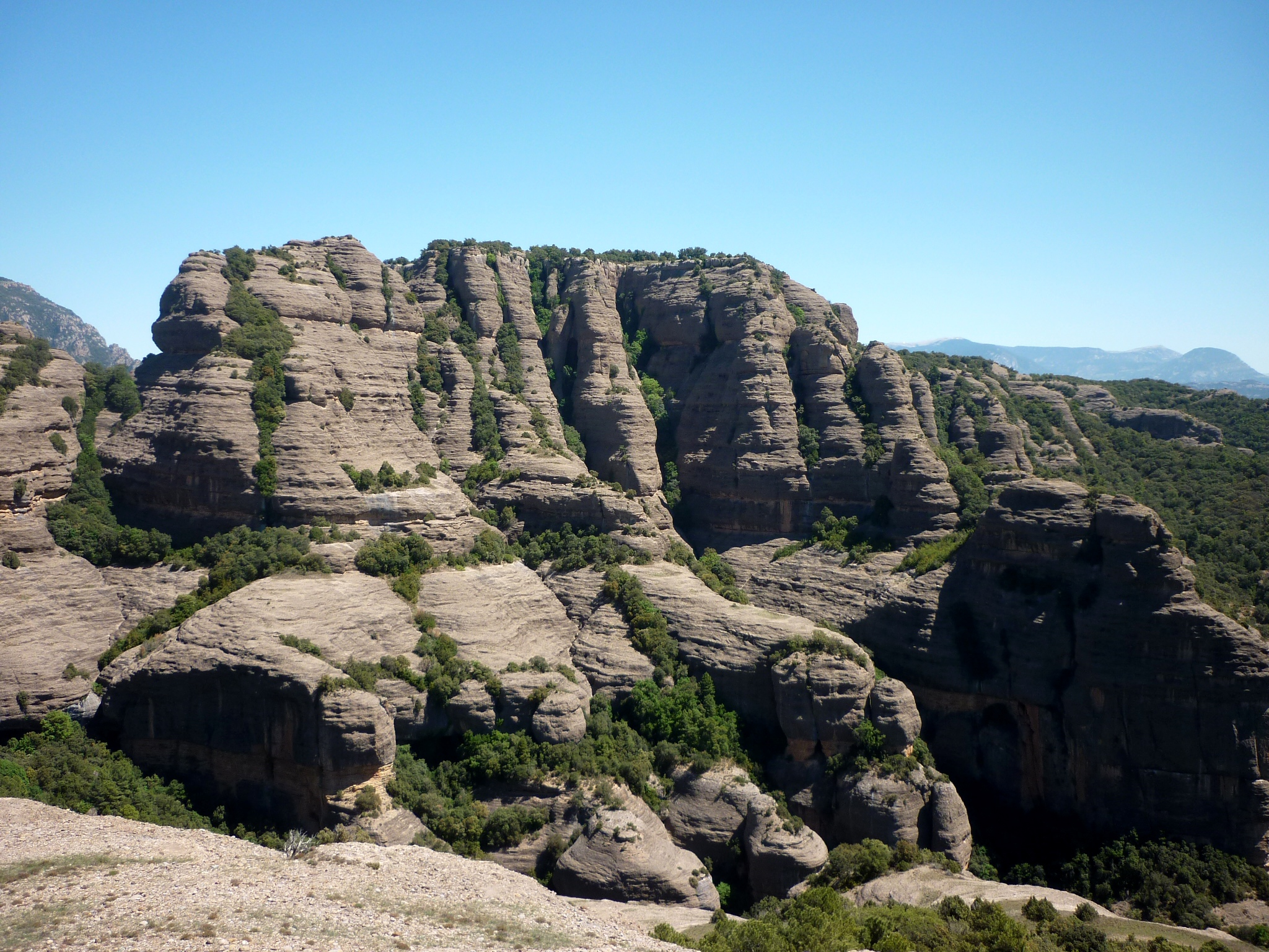 Sector central (Tres Ponts) de les Roques de Sant Honorat des de Sant Salvador del Corb (Peramola - Alt Urgell) This is a a photo of a natural area in Catalonia, Spain, with id: ES510175